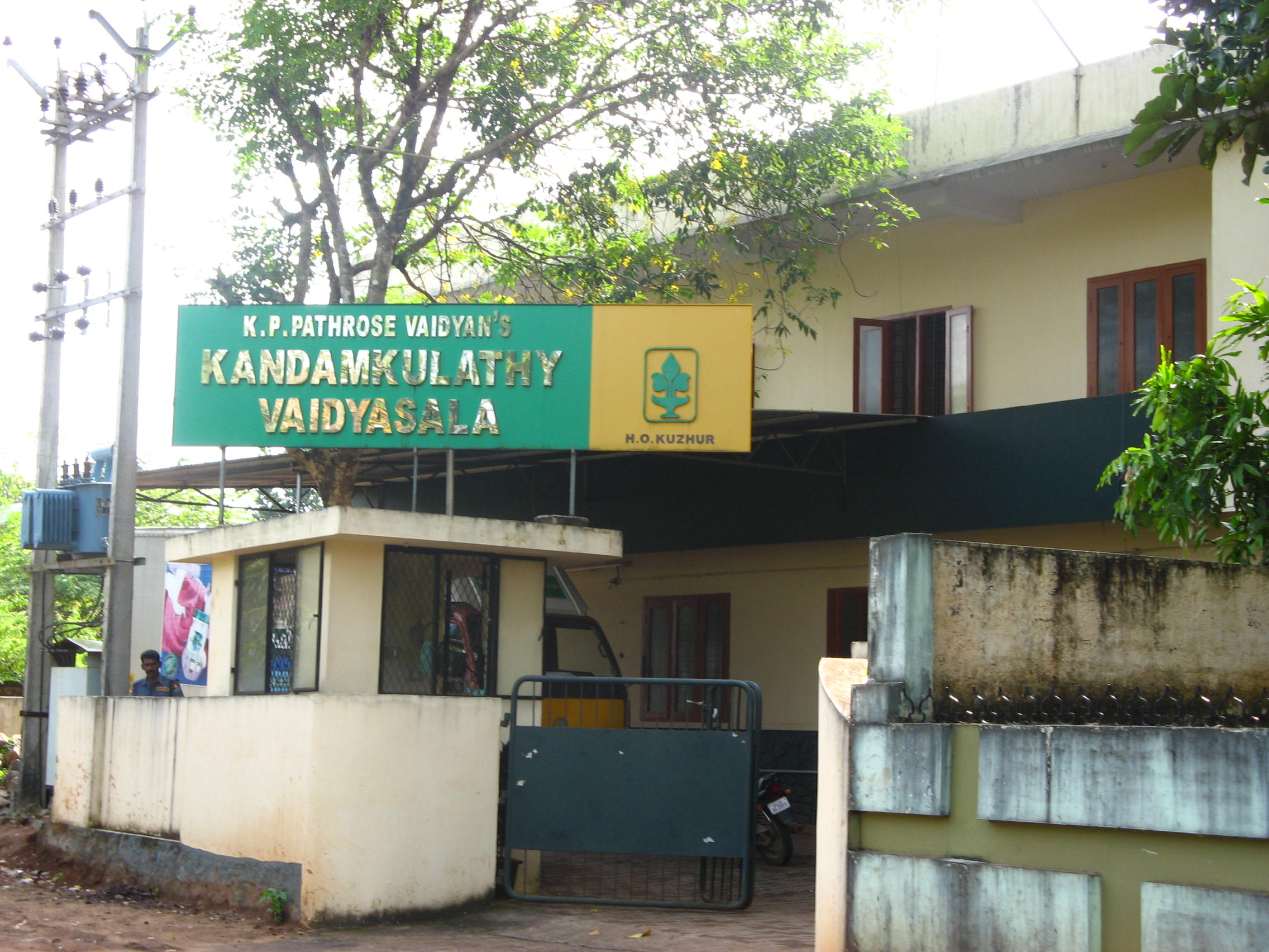 കണ്ടംകുളത്തി - പ്രധാന ഓഫീസ്